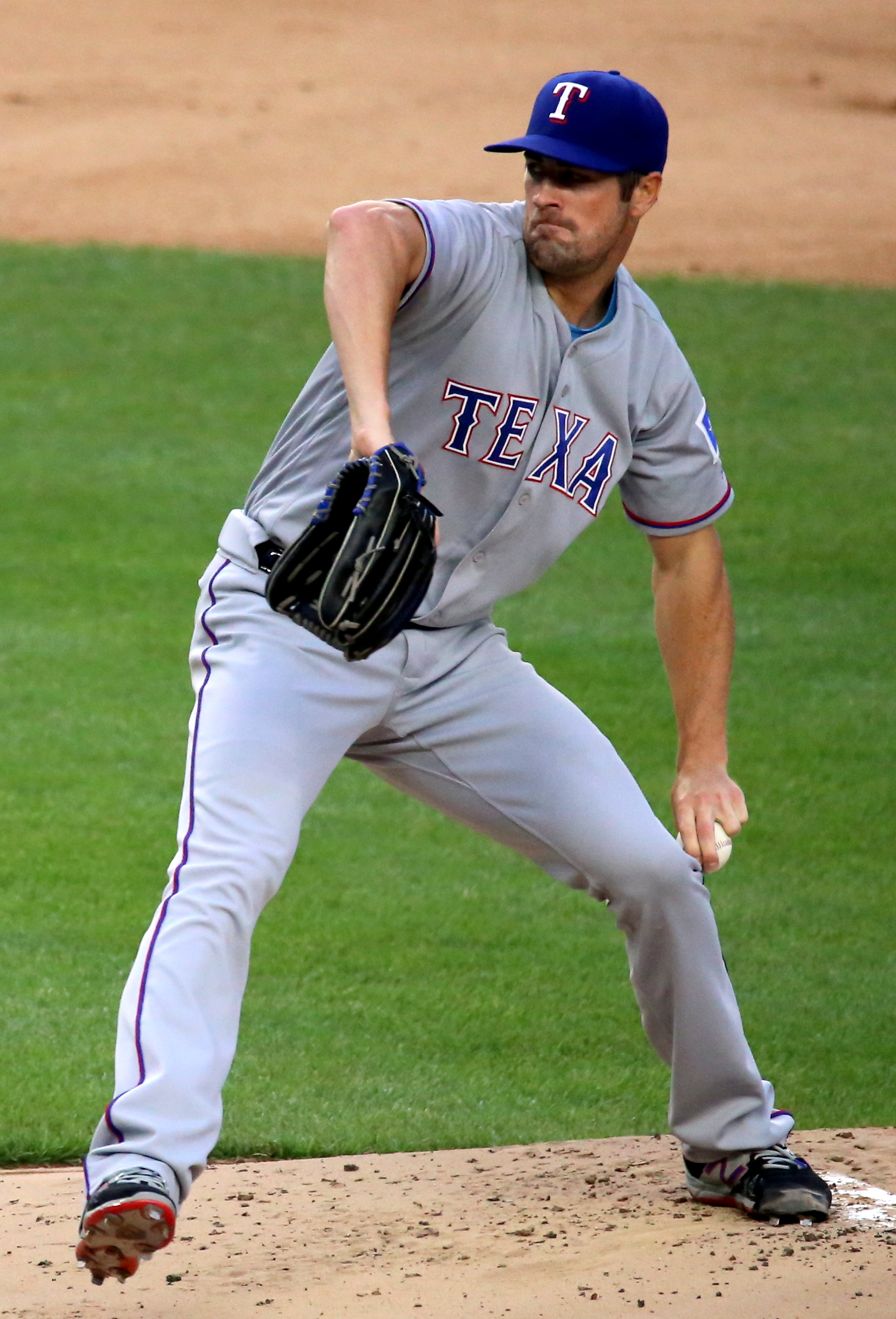 Cole Hamels